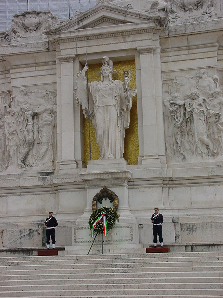 Altare della patria (dettaglio milite ignoto)